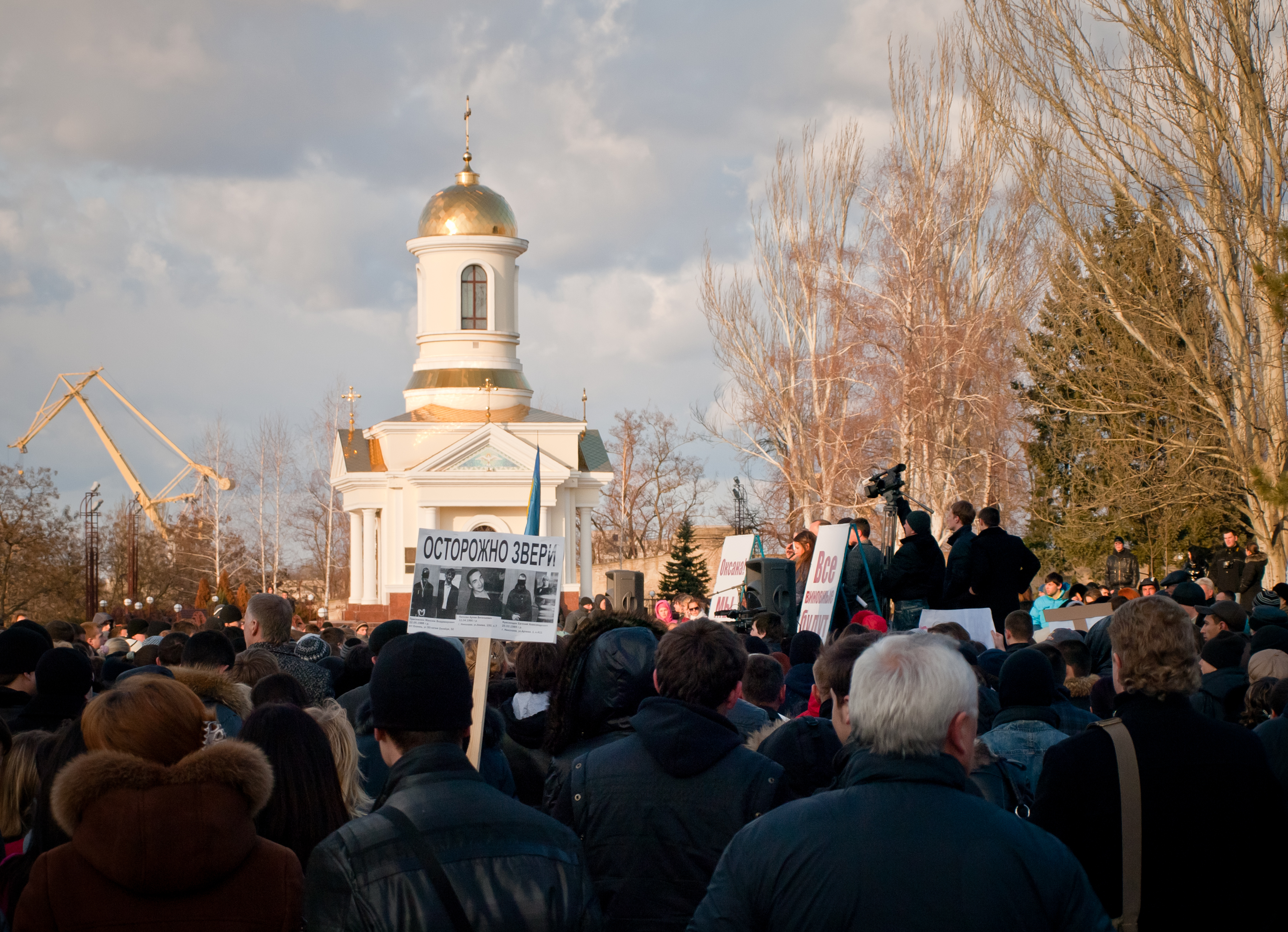 Акція протесту в підтримку Оксани Макар у Миколаєві